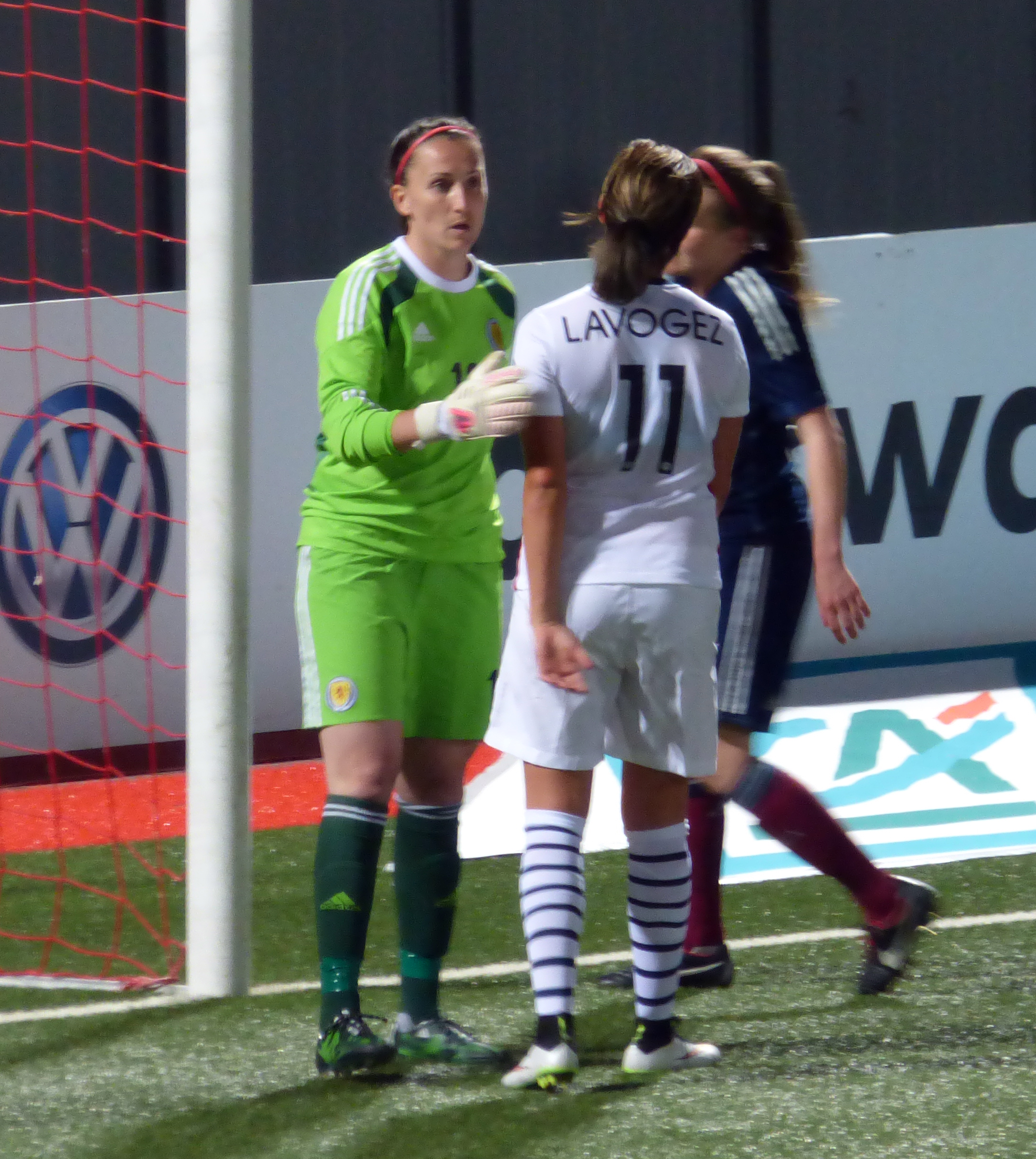 Match amicale FOOTBALL Féminin équipe de FRANCE conte l'ECOSSE 28 MAI 2015 1 à 0